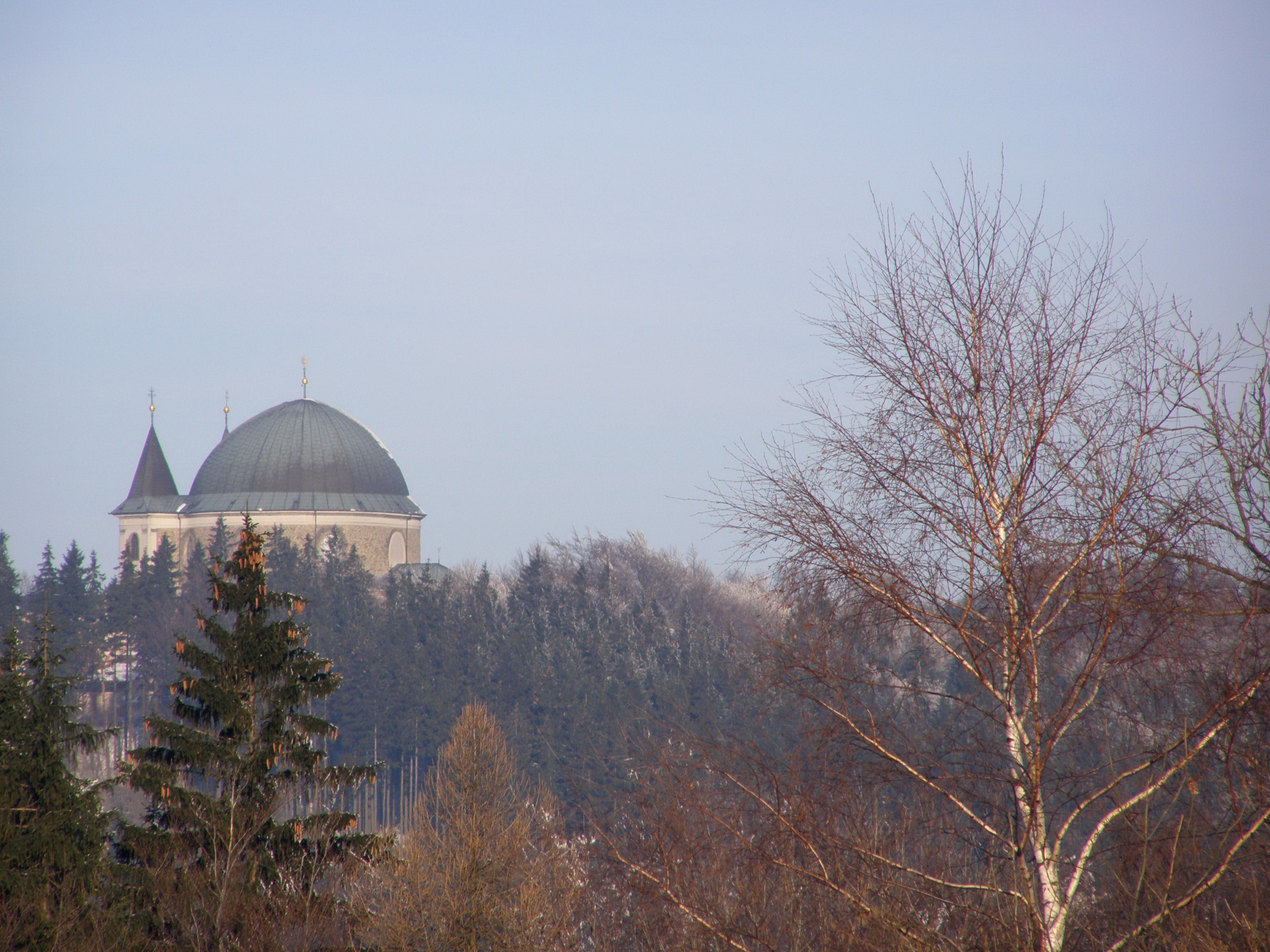 Hostýn (734 m), pohled na východní stranu z úbočí Skalného (708 m)